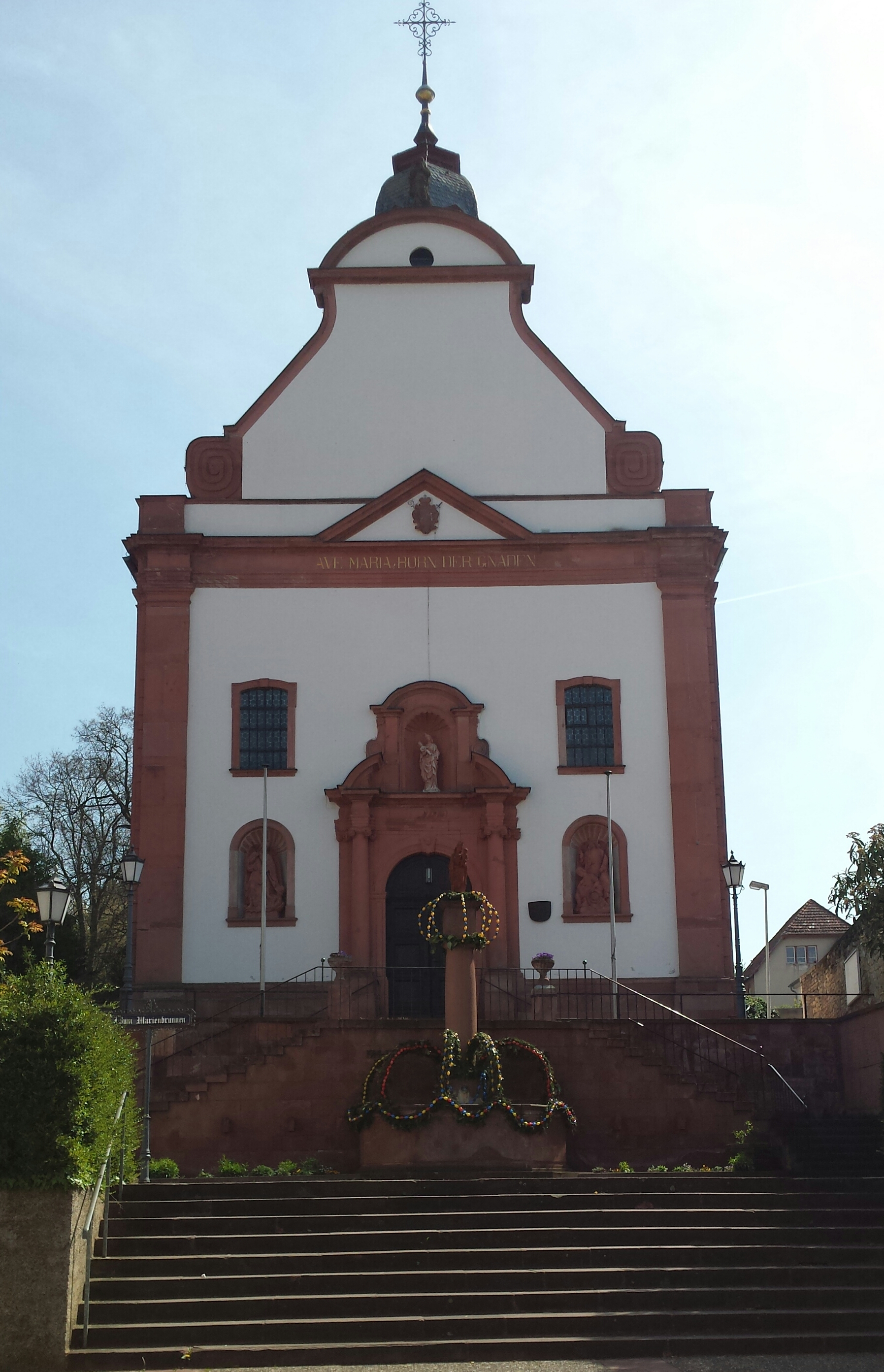 Wallfahrtskirche St. Stephan, mit geschmücktem Osterbrunnen; April 2017